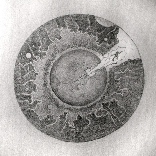 Illustration till artikel om New Tales of Mr Absurdity (Xin falu xiansheng tan) 新法螺先生譚 (1904)